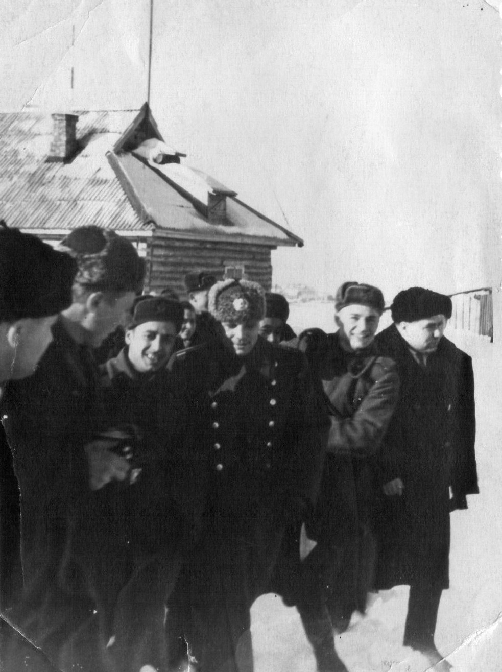 Встреча в аэропорту с Ю.А. Гагариным в Холм-Жирковском районе Смоленской области 27.02.1962 г. Второй справа Б.С. Гегечкори.